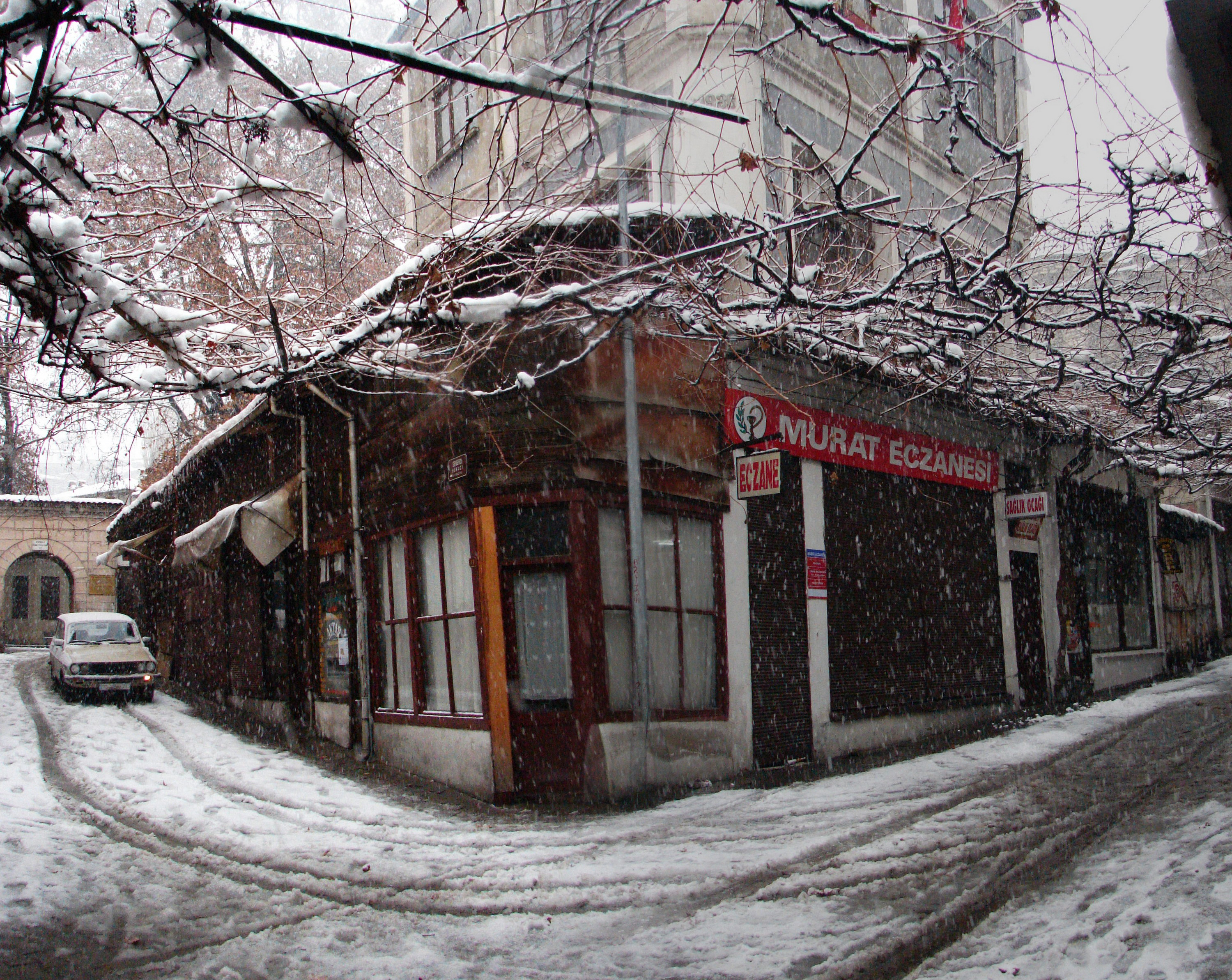 Safranbolu